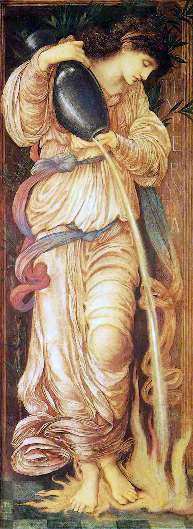 Temperantia